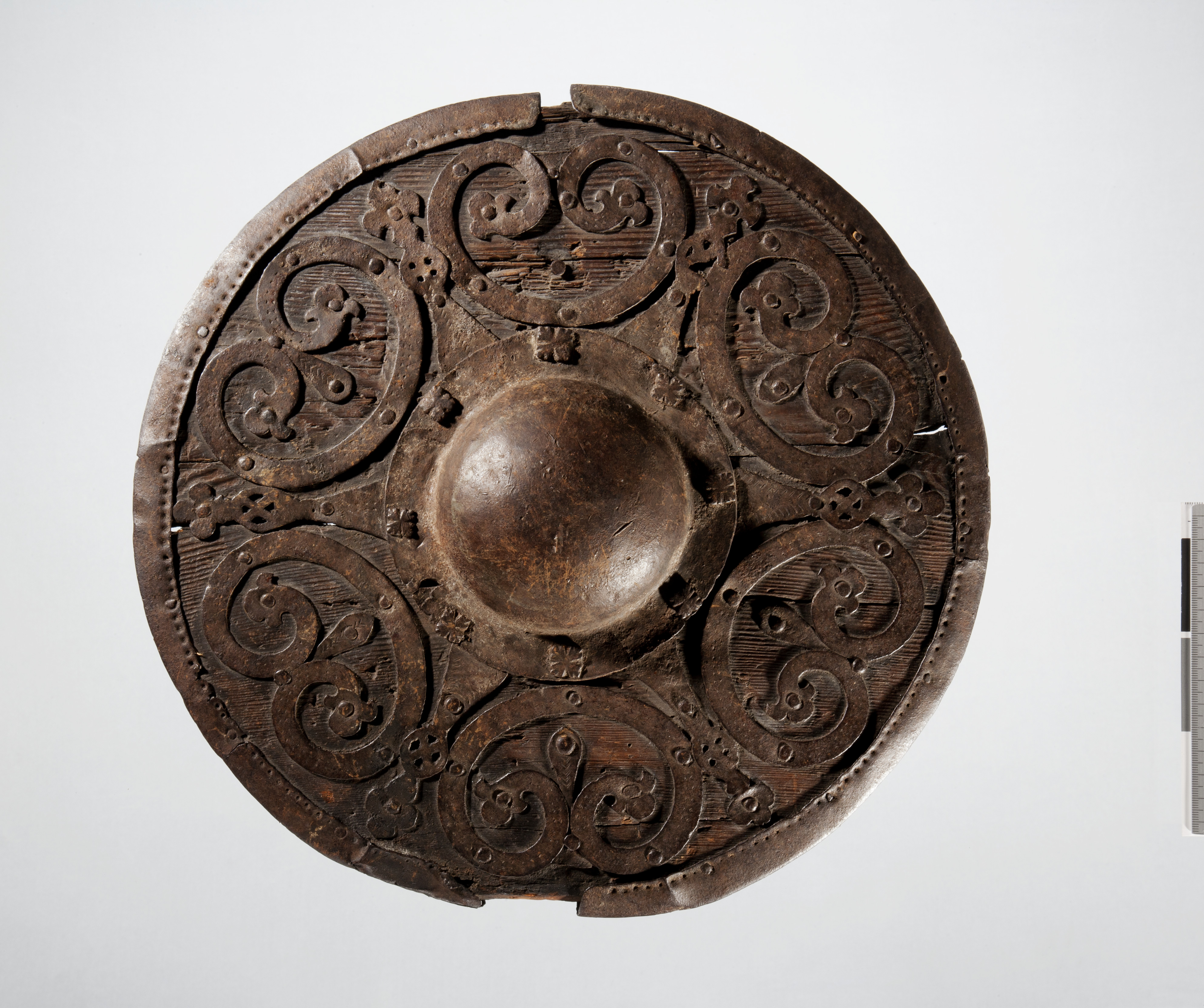 Middelalderskjold fra Valle i Aust-Agder. Foto Kulturhistorisk museum, Universitetet i Oslo, C1568.